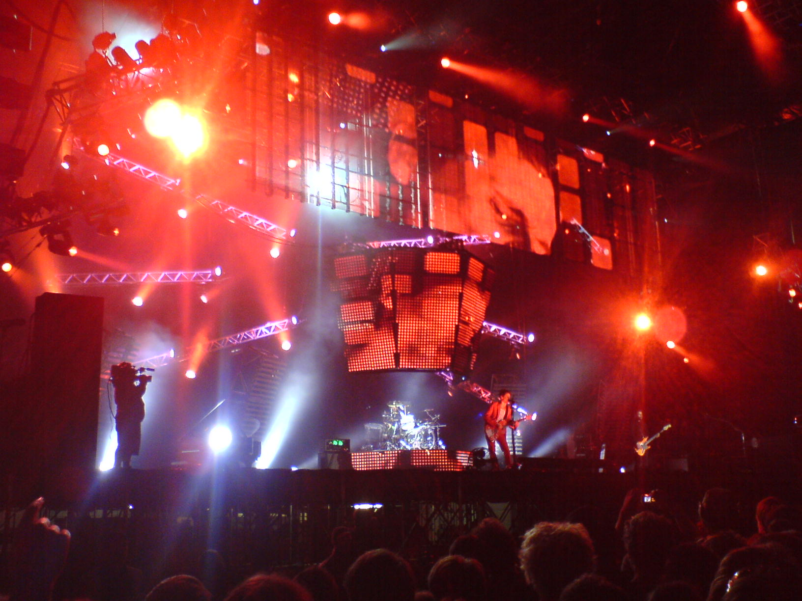 Muse headlining Oxegen 07